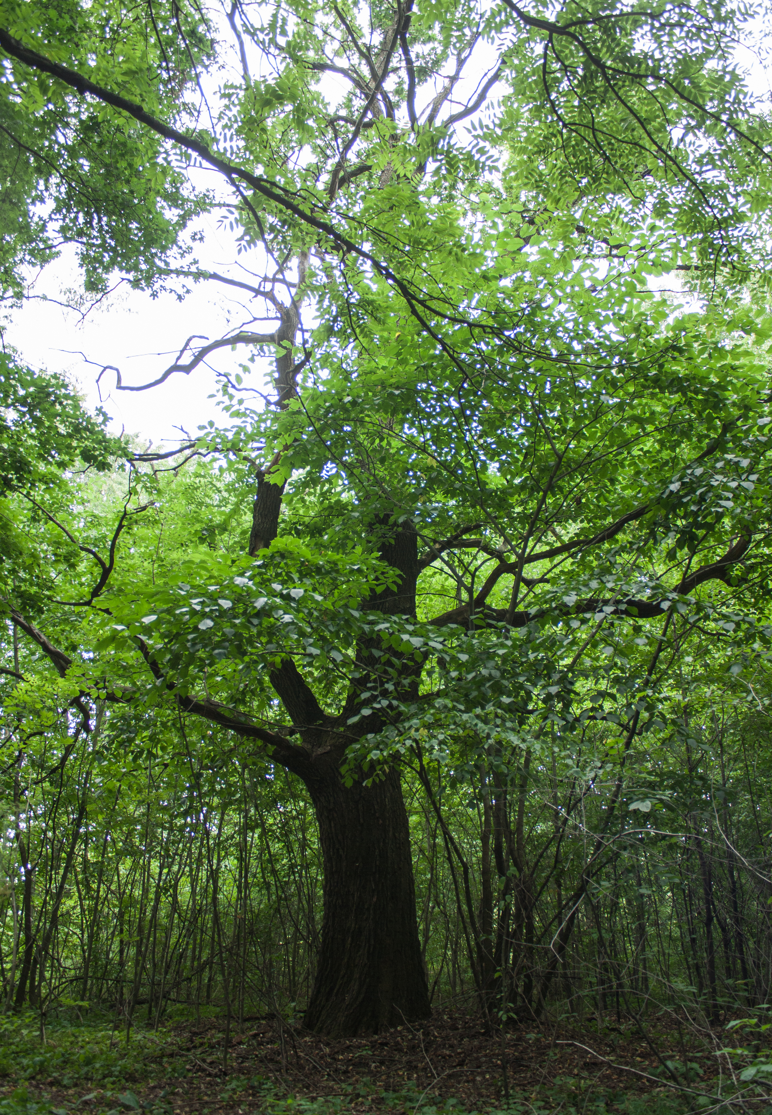 Вікові дерева груші і дуба, Маньківський район, с. Вікторівка, ур. «Рогова»